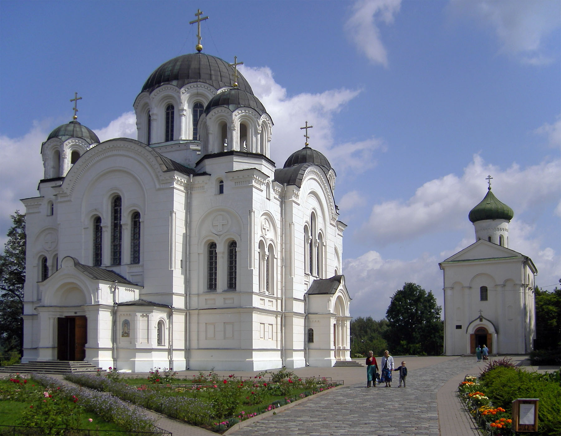 Krestovozdvizhensky church in St. Euphrosine monastery